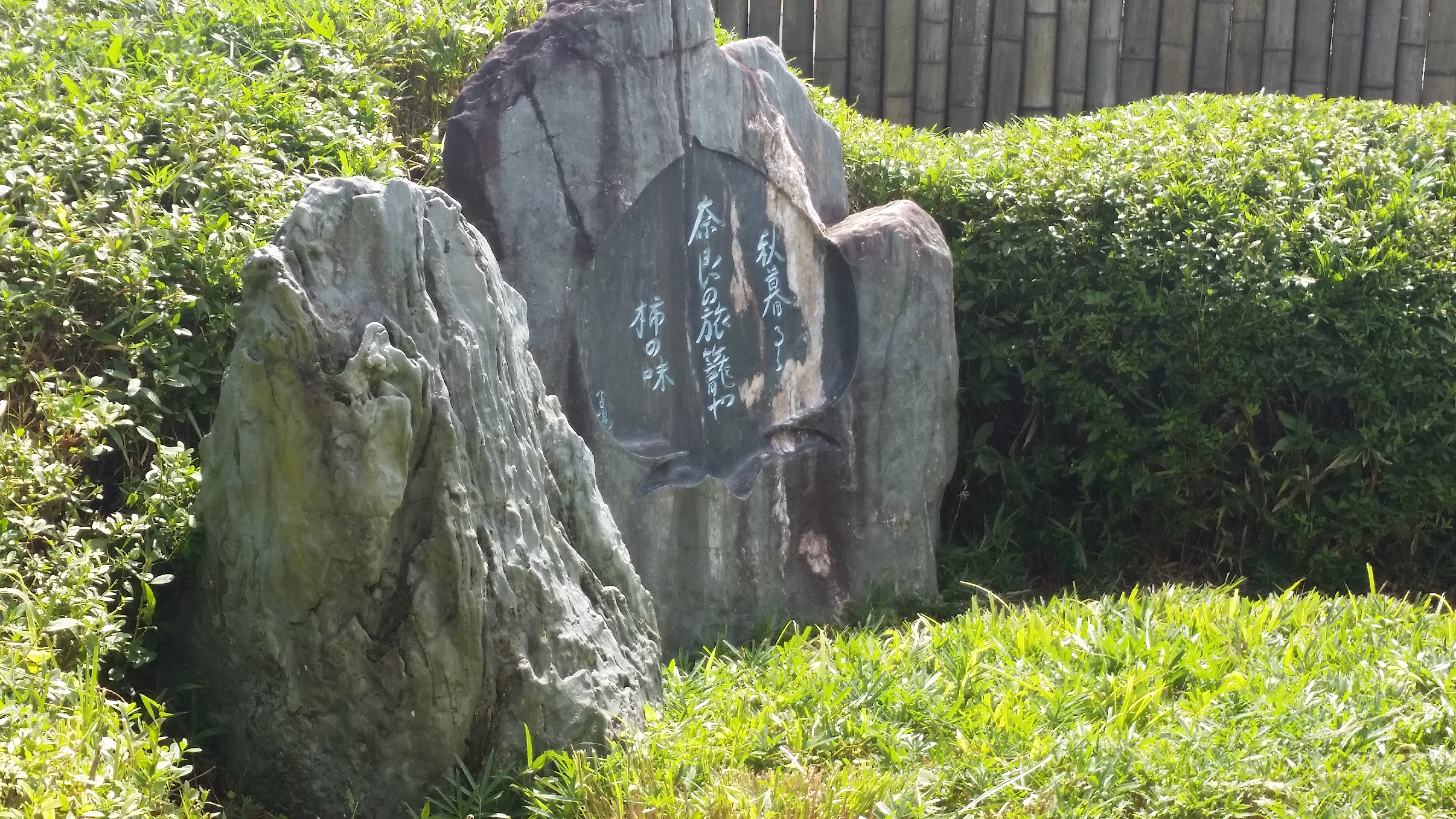 子規の庭、句碑：奈良